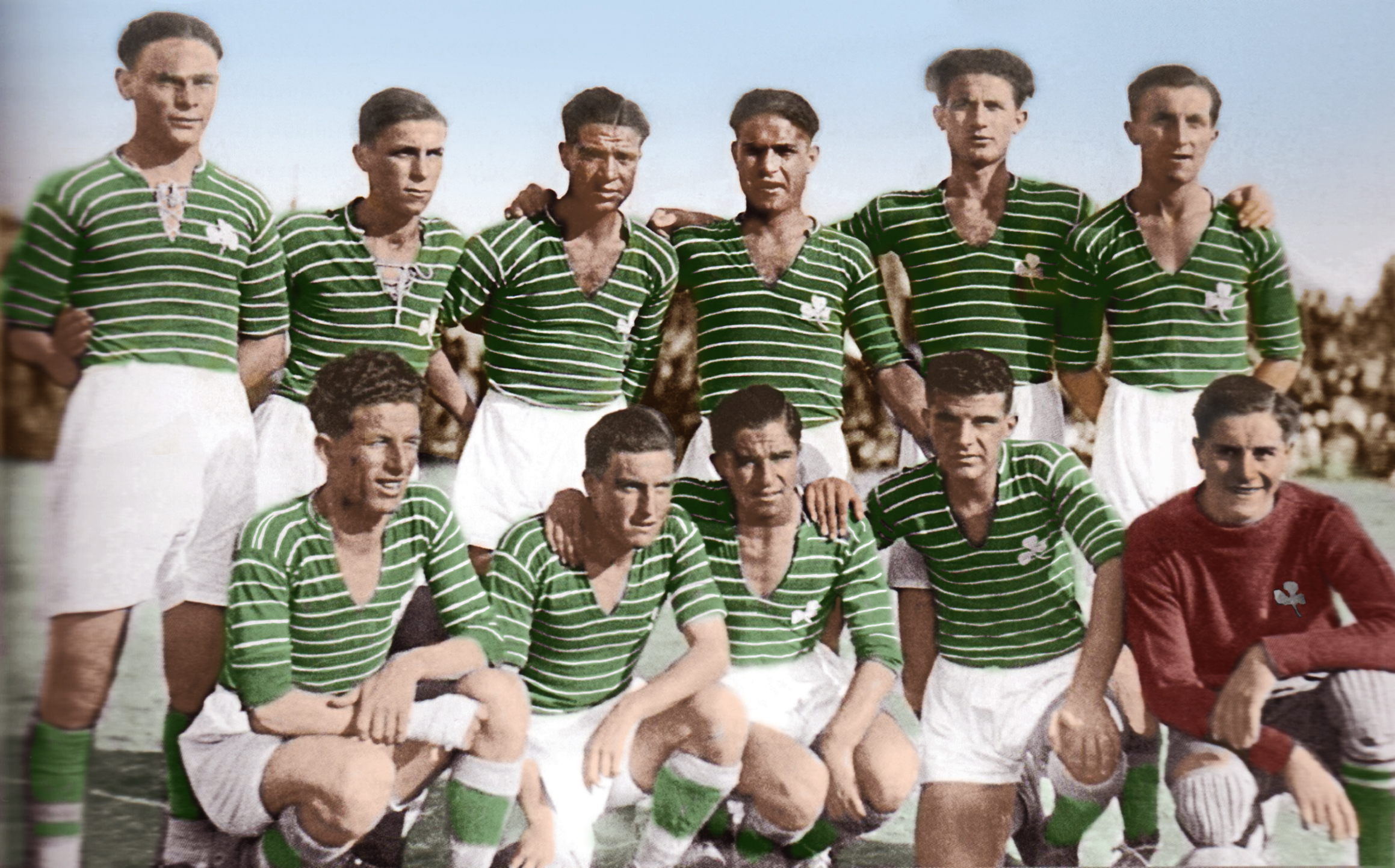 Η ποδοσφαιρική ομάδα του Παναθηναίκού το 1930, χρωματική επεξεργασία από το user Sportingn